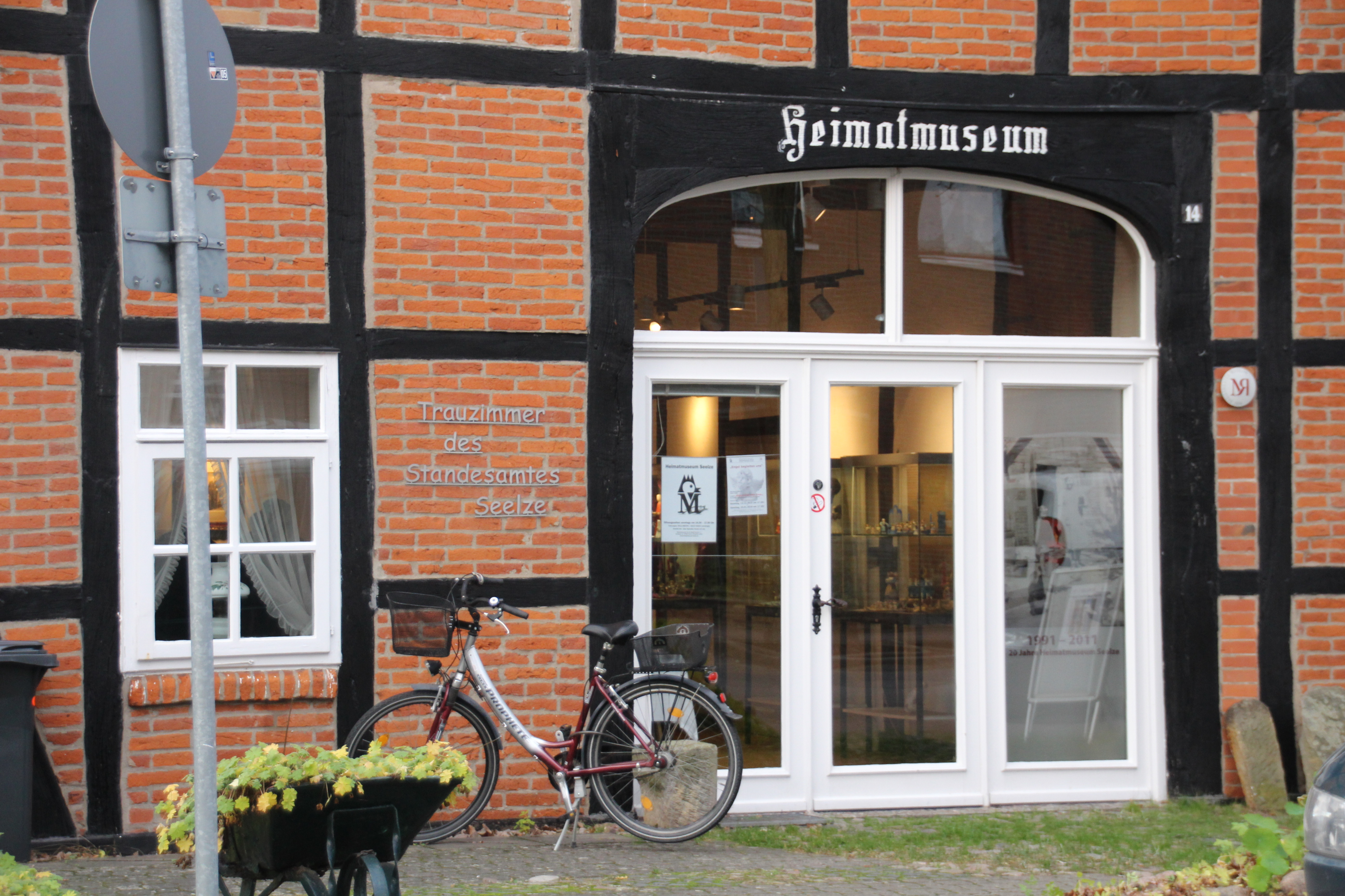 Im Jahr 1856 von Schuhmachermeister Friedrich Köhnsen aus Seelze errichtetes Fachwerkhaus in Seelzes heutigem Ortsteil Letter.